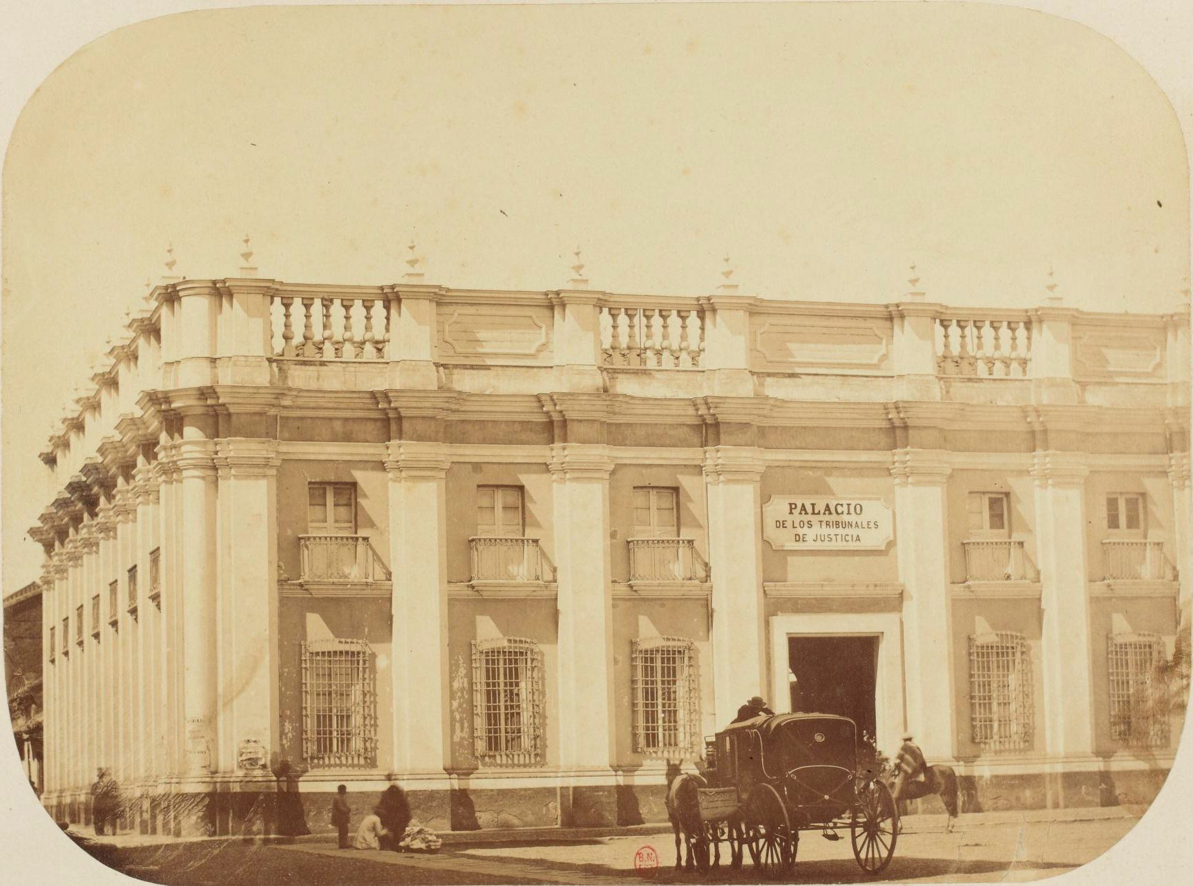 Palacio de Tribunales de Justicia de Santiago de Chile (1865)